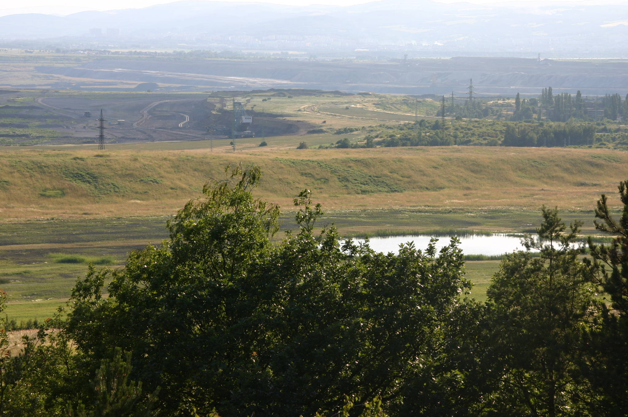 Platz der ehemaligen Gemeinde Hareth im Bezirk Brüx.